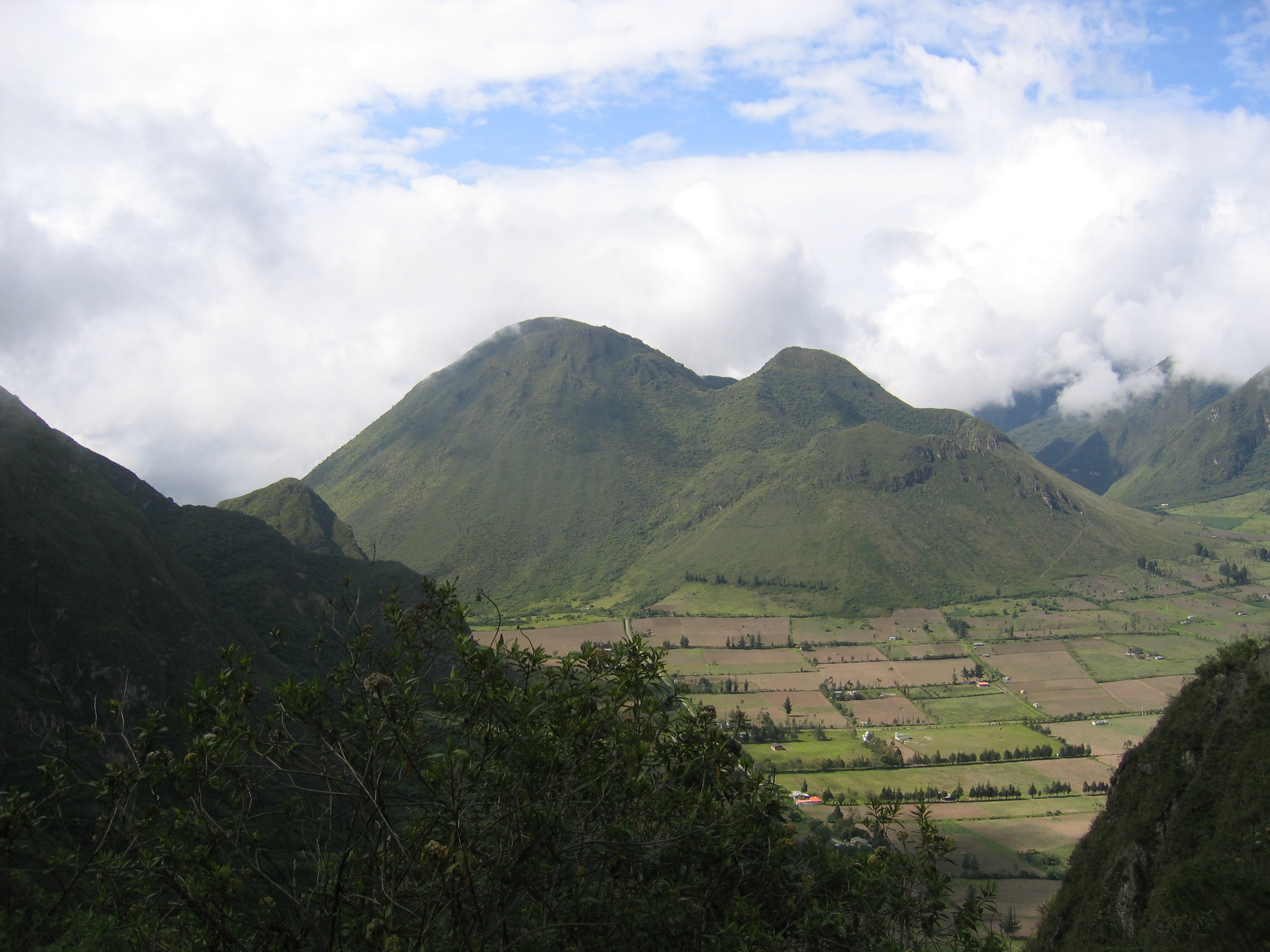 Caldera von Pululahua (Ecuador). Blick vom Aussichtspunkt Richtung Westen zum Rumiloma Krater (vorderer Berg) und Cerro Pondoña (hinten links)